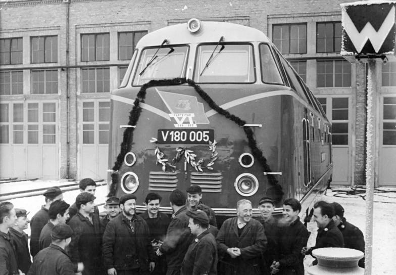 Diesellok V 180 005 (BR V180), Fertigstellung Zentralbild Hesse AV.v. 11.1.1963 Anläßlich des VI. Parteitages der SED haben die Lokomotivbauer aus dem VEB "Karl Marx" in Babelsberg die erste neue Diesellok vom Typ V 180 mit einer Leistung von 1800 PS der Deutschen Reichsbahn zur Verfügung gestellt. Alle in der Projektierung vorgesehenen Leistungen wurden erreicht. Die Lok wird auf den Strecken Berlin-Erfurt, Berlin-Rostock und auf dem Berliner Außenring eingesetzt. UBz: Die Lokomotivbauer der Brigade "V 180" haben mit der Übergabe der ersten neuen Lok noch vor dem Parteitag Wort gehalten und ihre Verpflichtung eingelöst. [Diesellokokotive V 180 005 (Baureihe V 180), Fertigstellung]